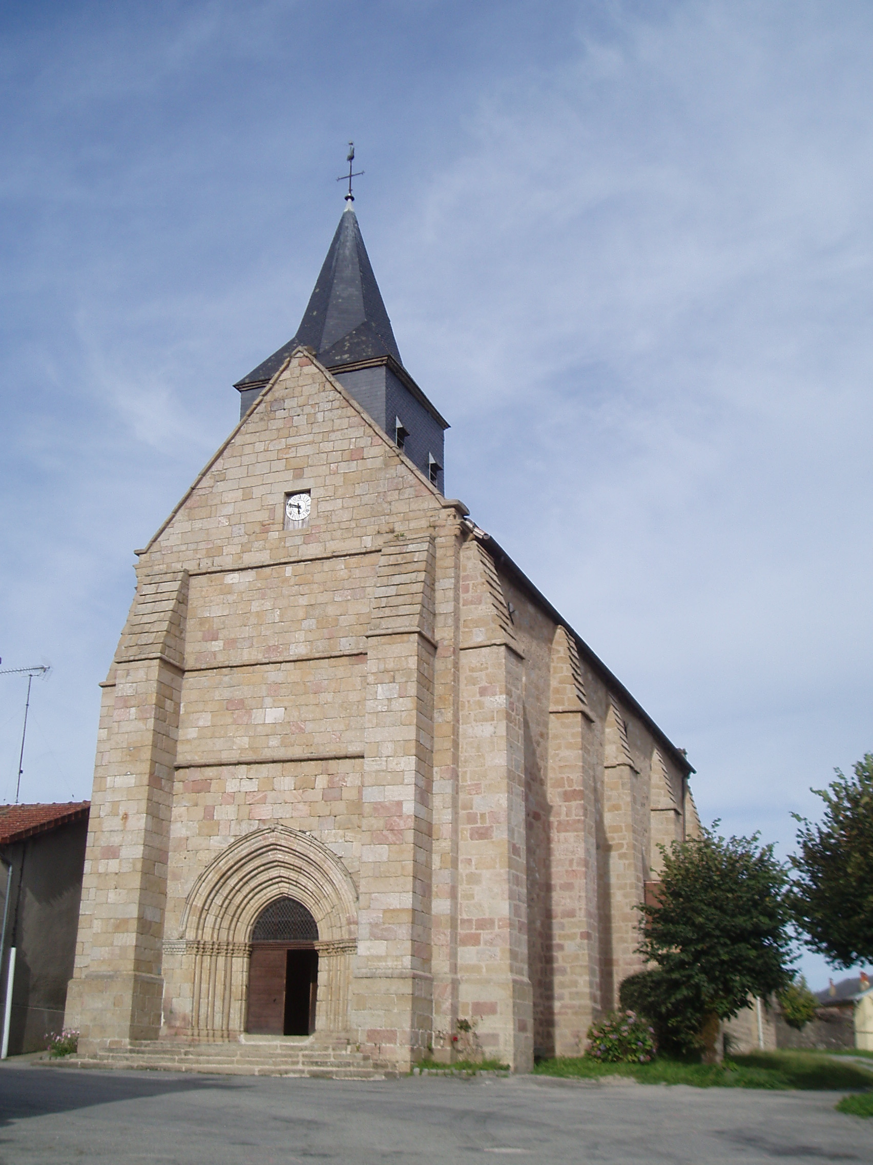 église de Creuse